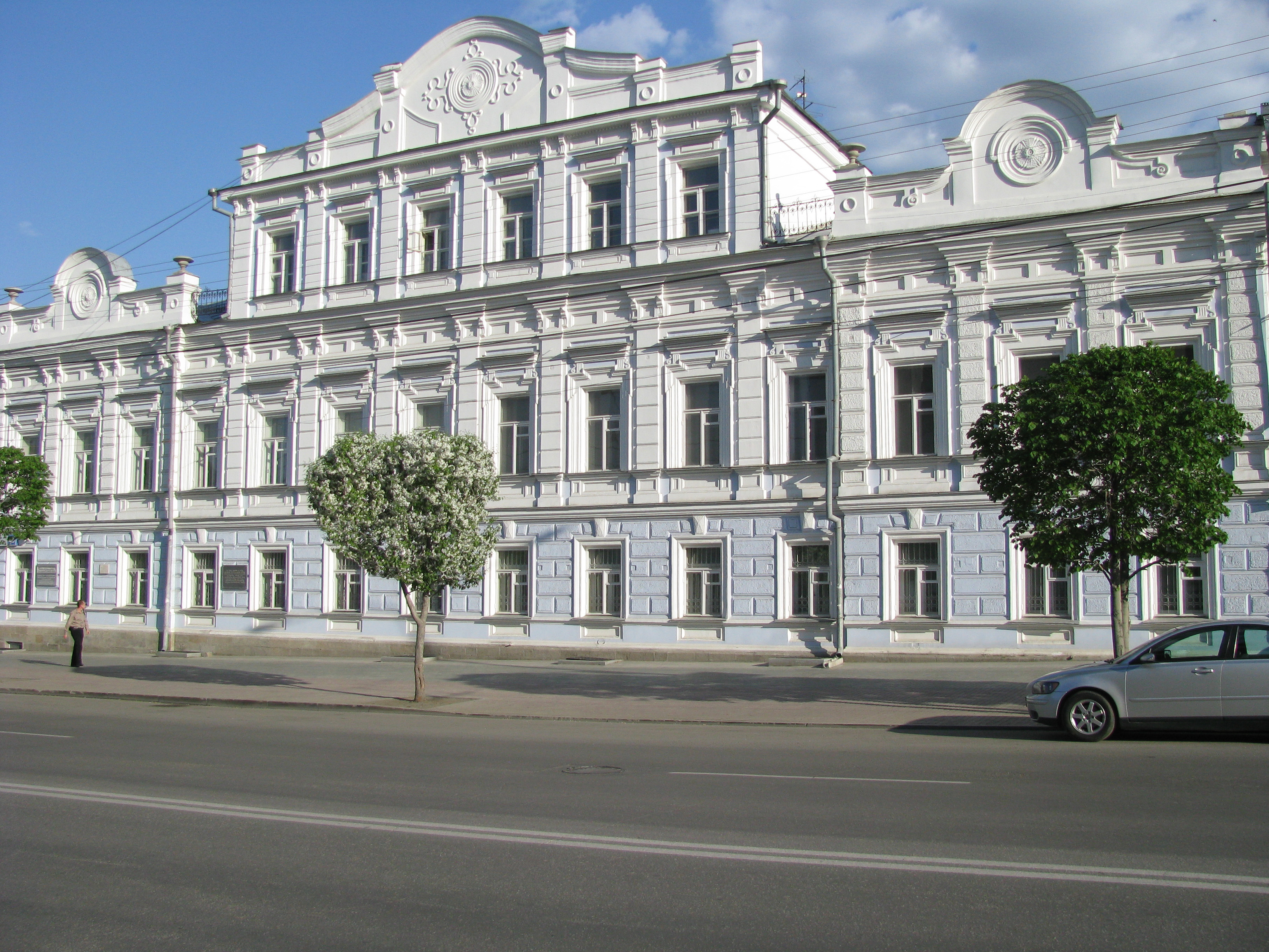 Свердловский областной краеведческий музей (площадка на ул. Малышева)